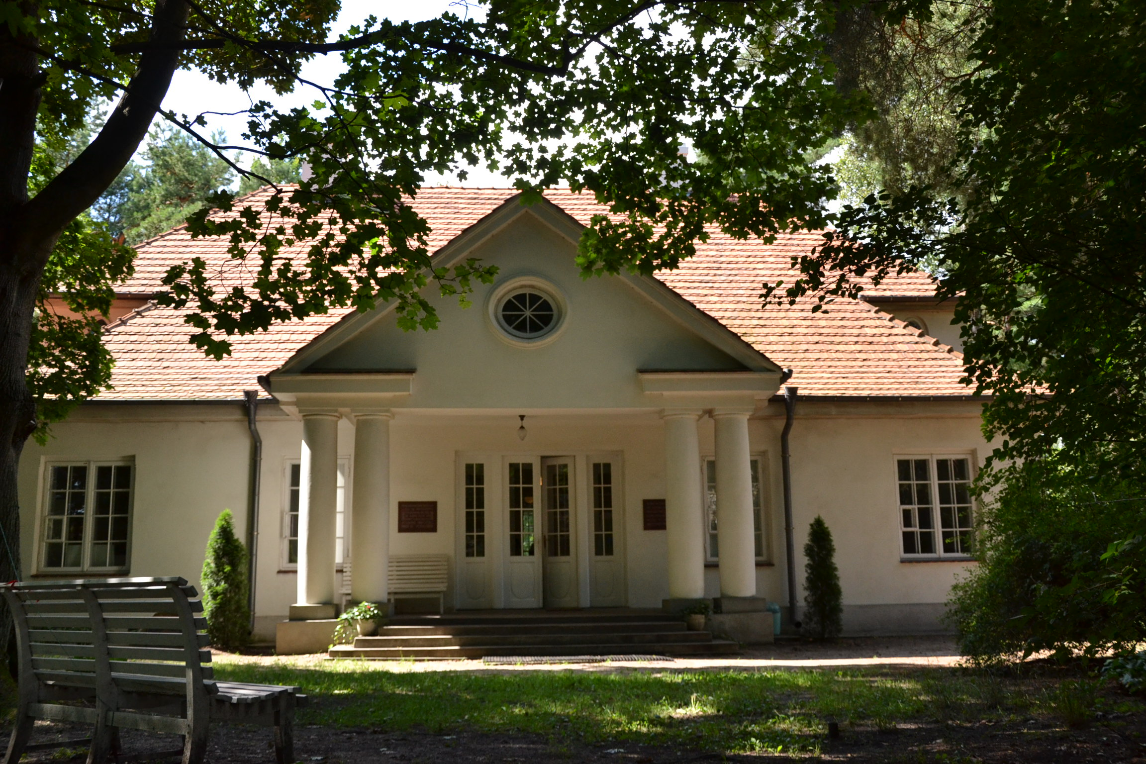 1348 zespół dworku Marszałka Józefa Piłsudskiego - front budynku Sulejówek FILM07